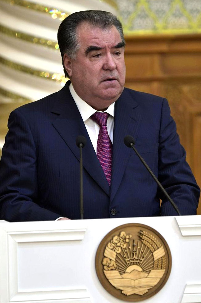 Президент Таджикистана Эмомали Рахмон на официальном приёме в честь Президента России Владимира Путина